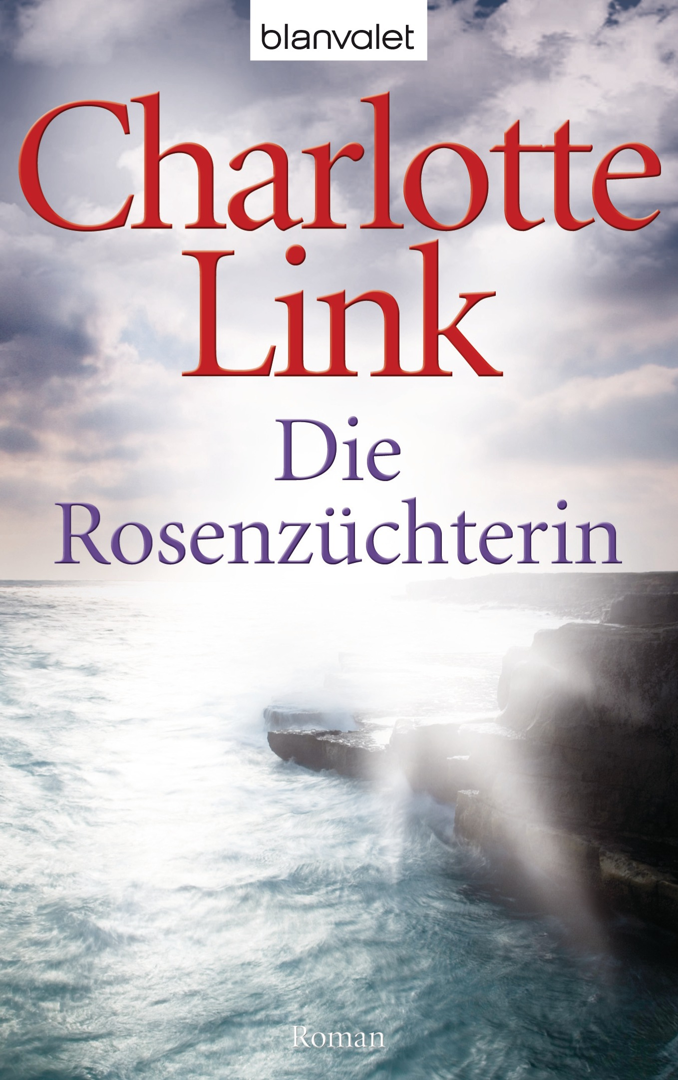 Charlotte Link: Die Rosenzüchterin. Blanvalet, München 2010. DNB